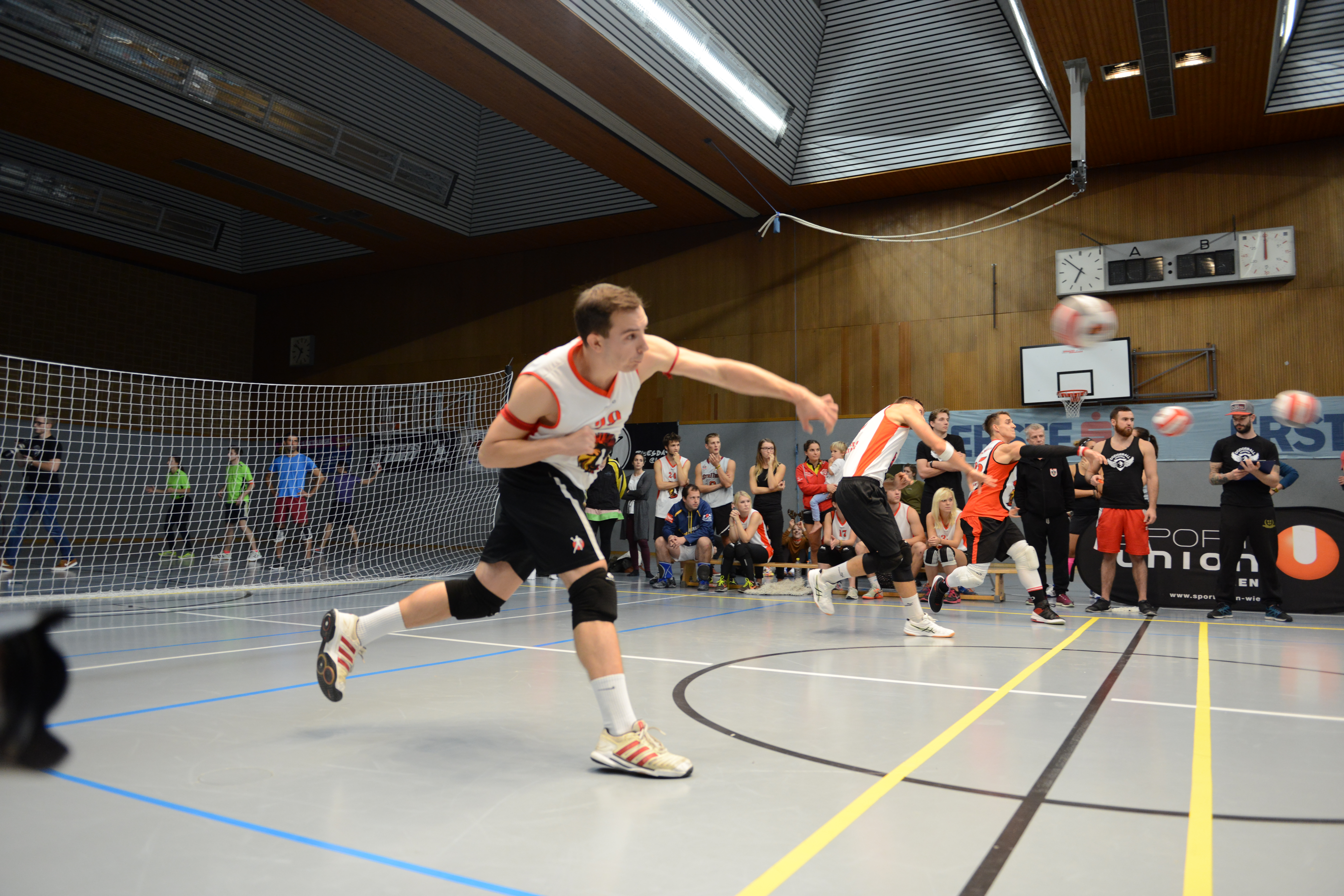 Dodgeball Wurf gross